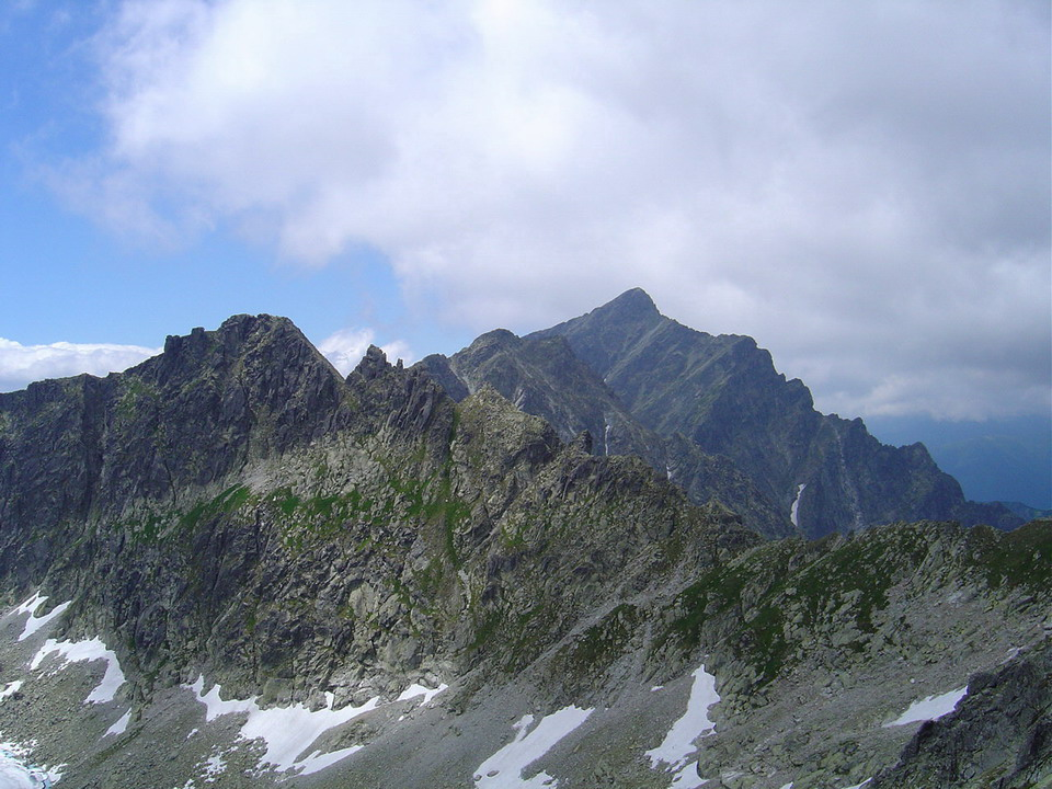 Ostra and Krivan from Bystre sedlo